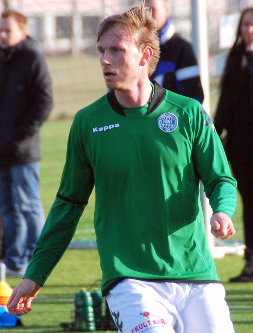 Fodboldspilleren Asbjørn Sennels fra Viborg FF. Her i en testkamp mod Blokhus FC på VFFs træningsanlæg på Kirkebækvej i Viborg.